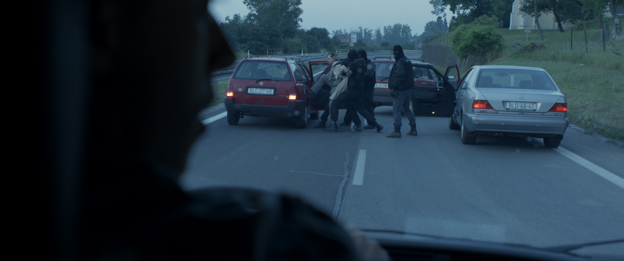 Ukážka z filmu